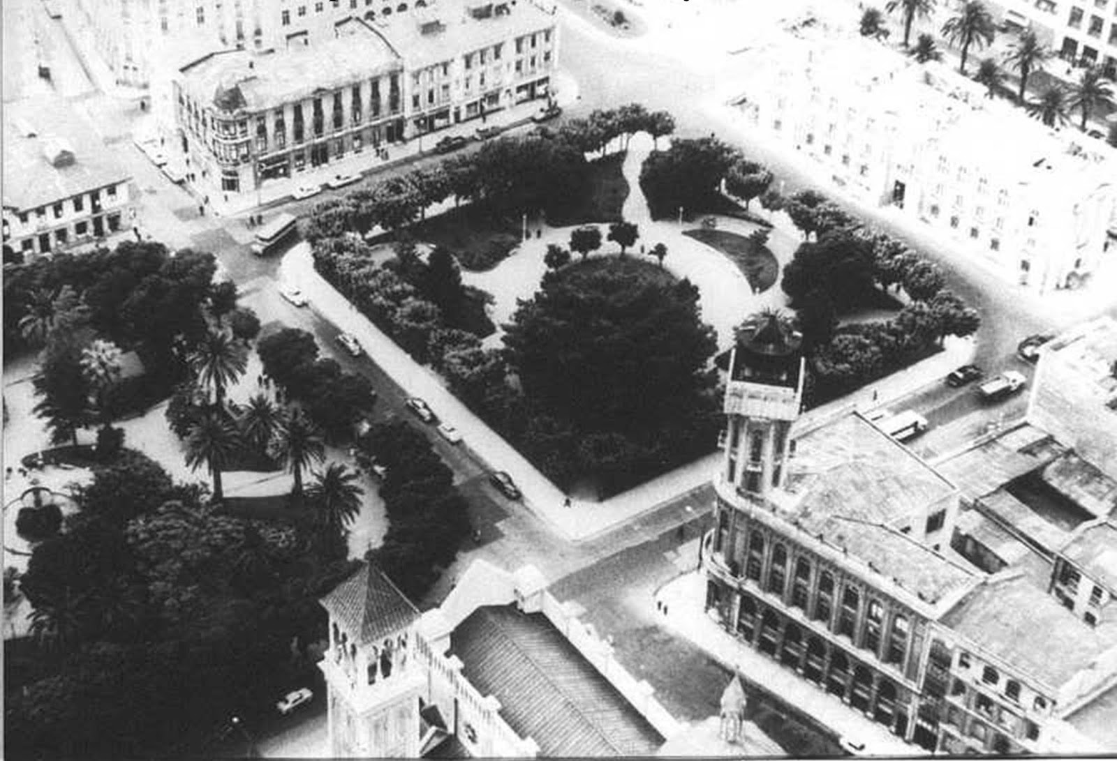 imagen aérea de las plazas Victoria y simón Bolívar en Valparaíso